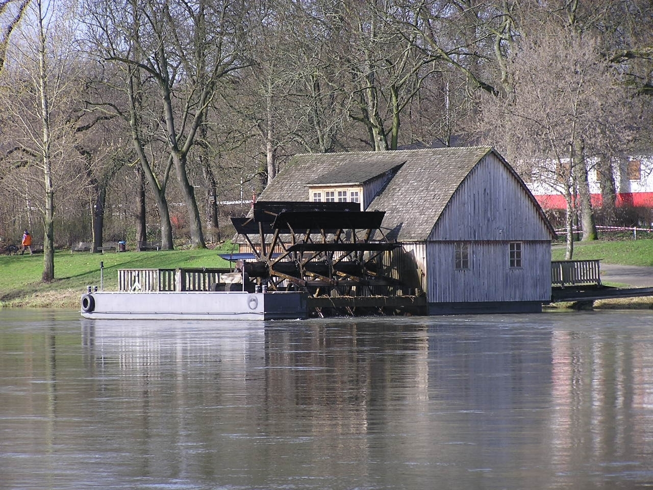 Schiffmühle in Minden, Nordrhein-Westfalen, an der Weser. Die Schiffmühle ist Teil der Westfälischen Mühlenstraße.